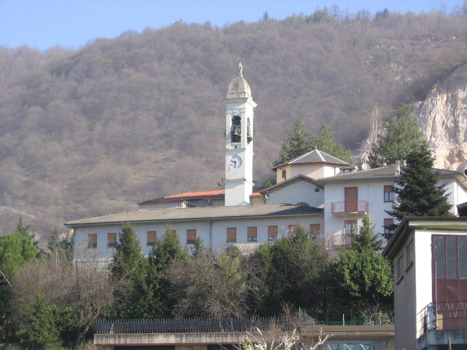 Zandobbio, Bergamo, Italia